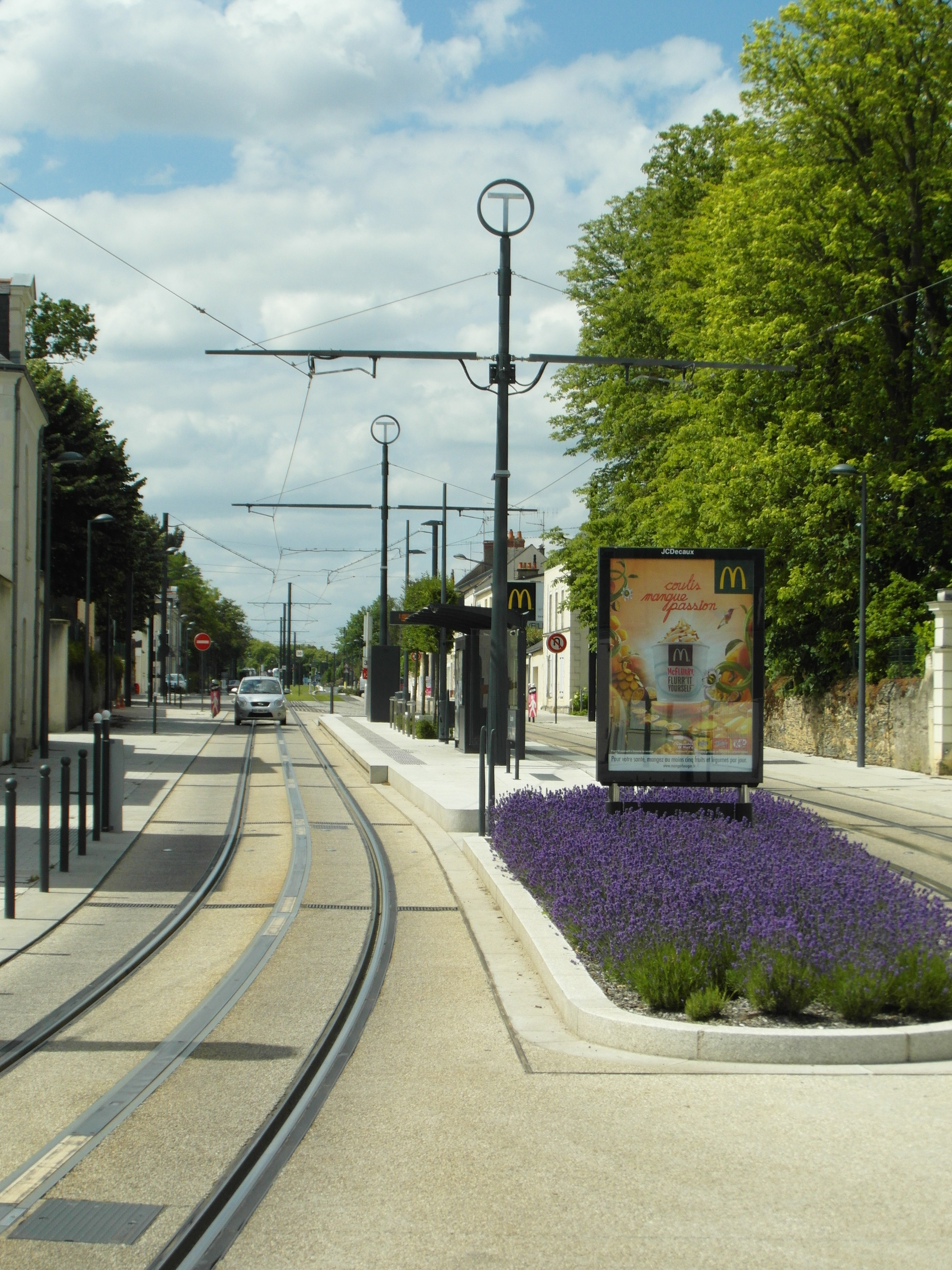 Straßenbahn Angers - Städtebaulcihe Integration im Abschnitt Avrillé